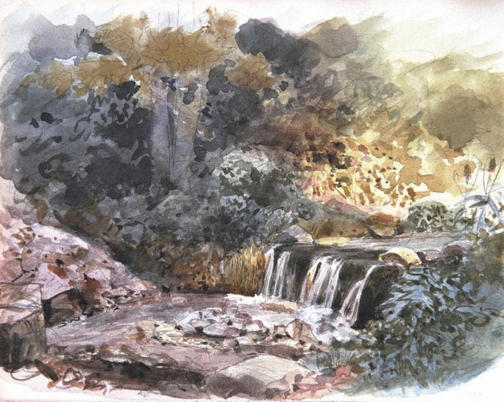 Flussbett der Steinlach. Lavierte Zeichnung.